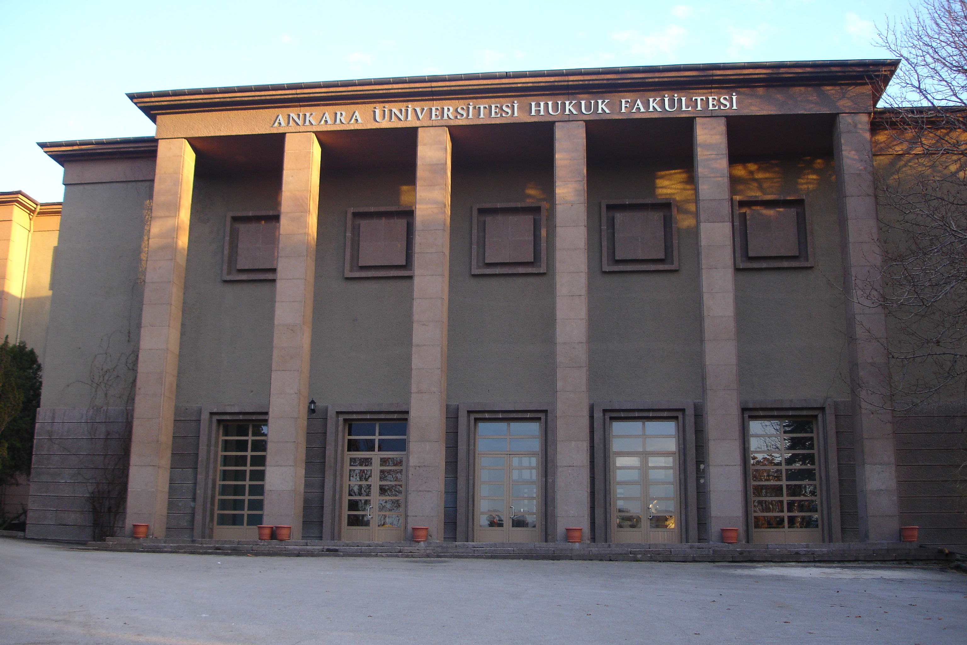 Ankara Hukuk Ön Bina